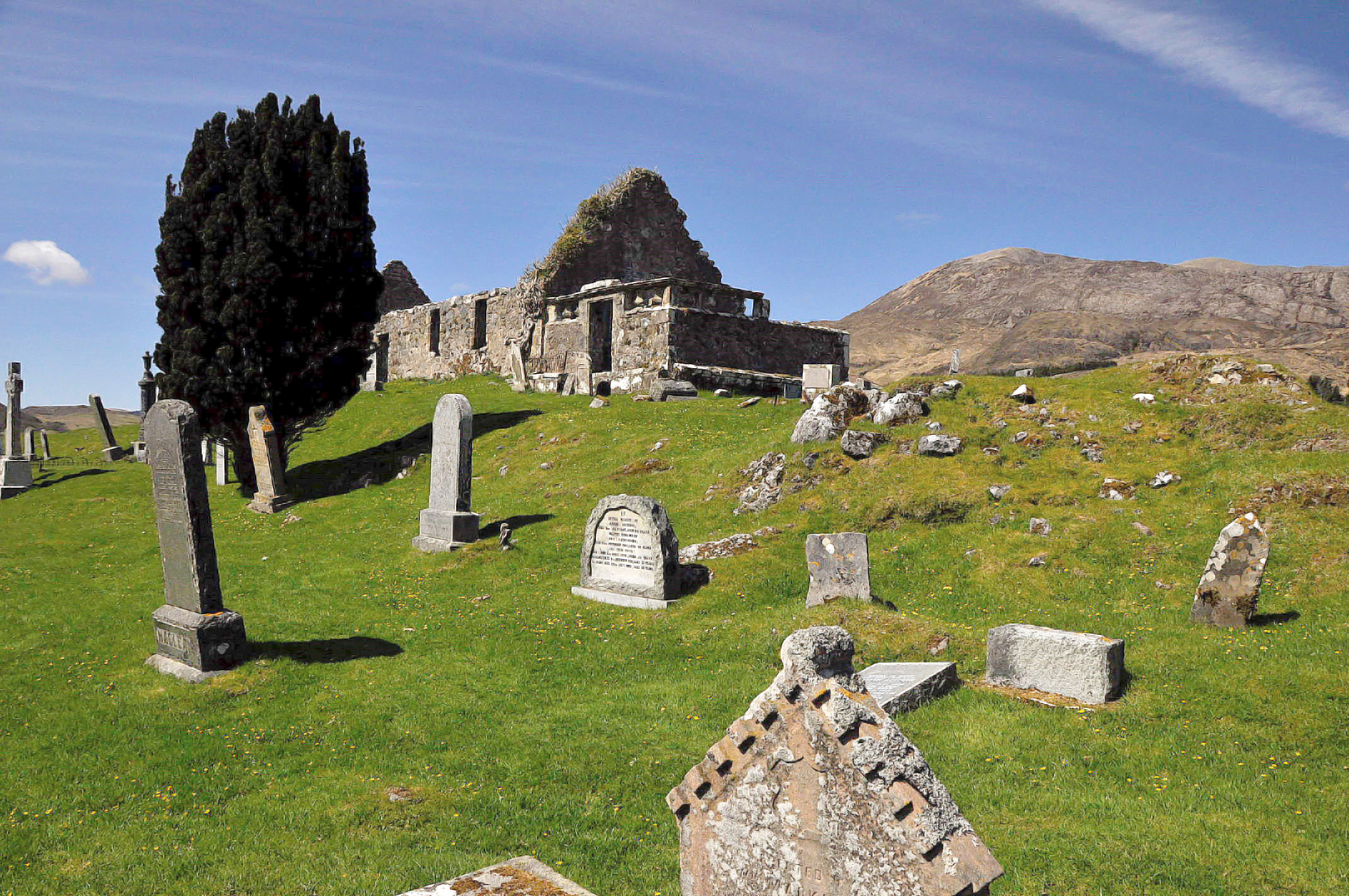 Cill Chriosd (kerk van Christus) in de vallei Swordale op Skye, Schotland